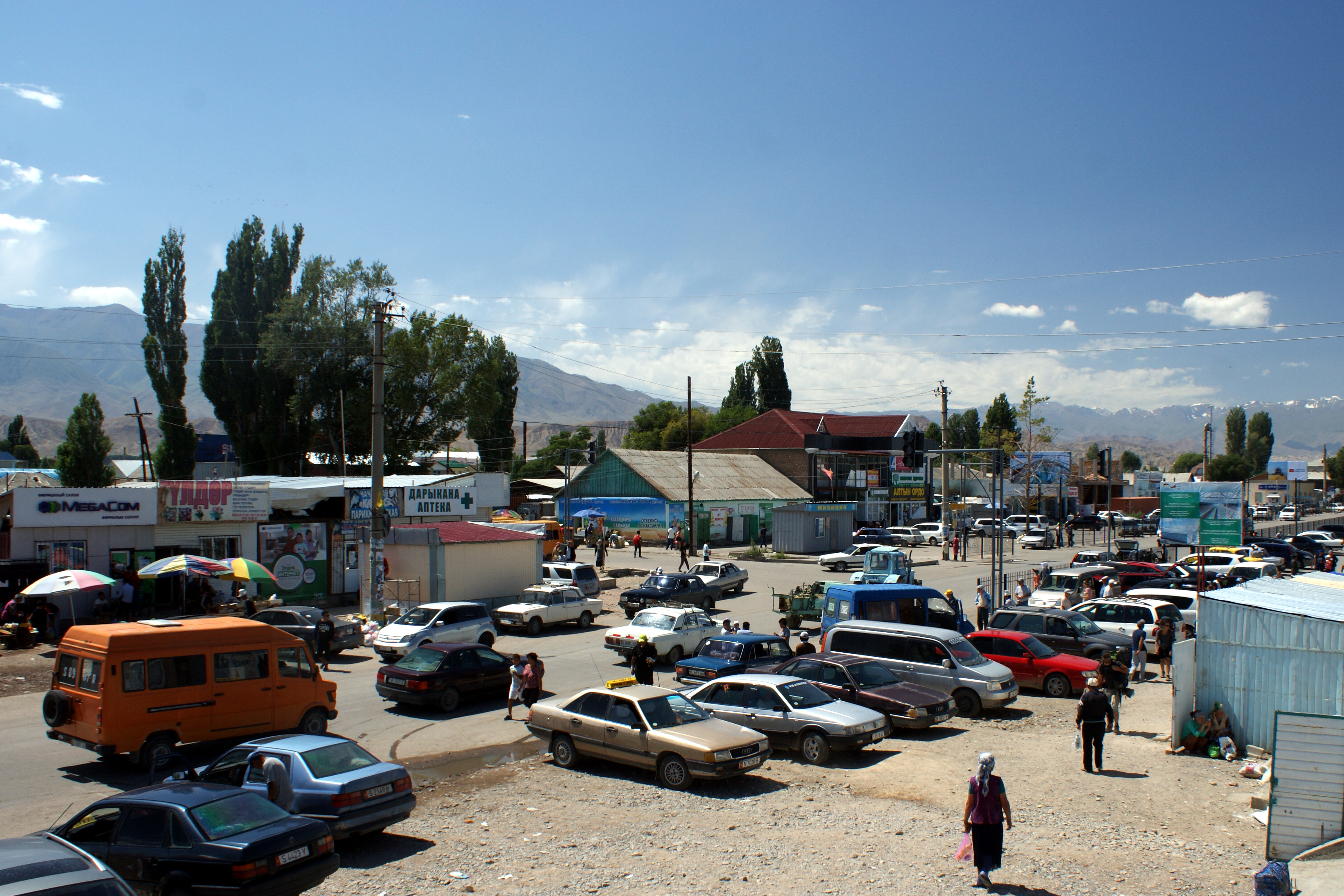 Zentrum Kochkors